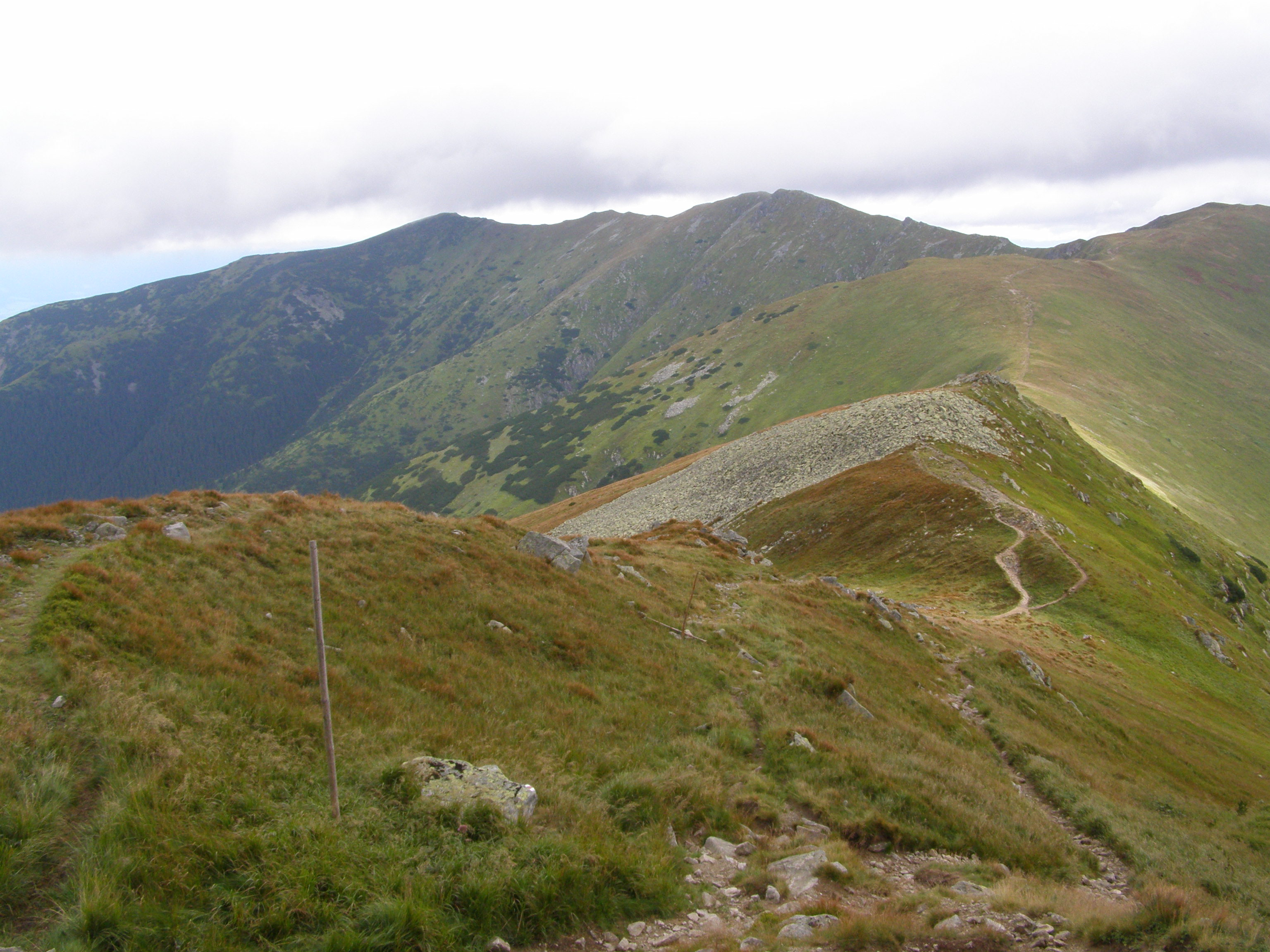 Nízké Tatry, Ďumbierské Tatry, výhled z úbočí vrcholu Kotliská (1937 m) na severovýchod: vlevo trojvrcholový vrch Bôr (vlevo 1719 m, uprostřed 1888 m, vpravo 1915 m), vpravo vrchol Poľana (1890 m)